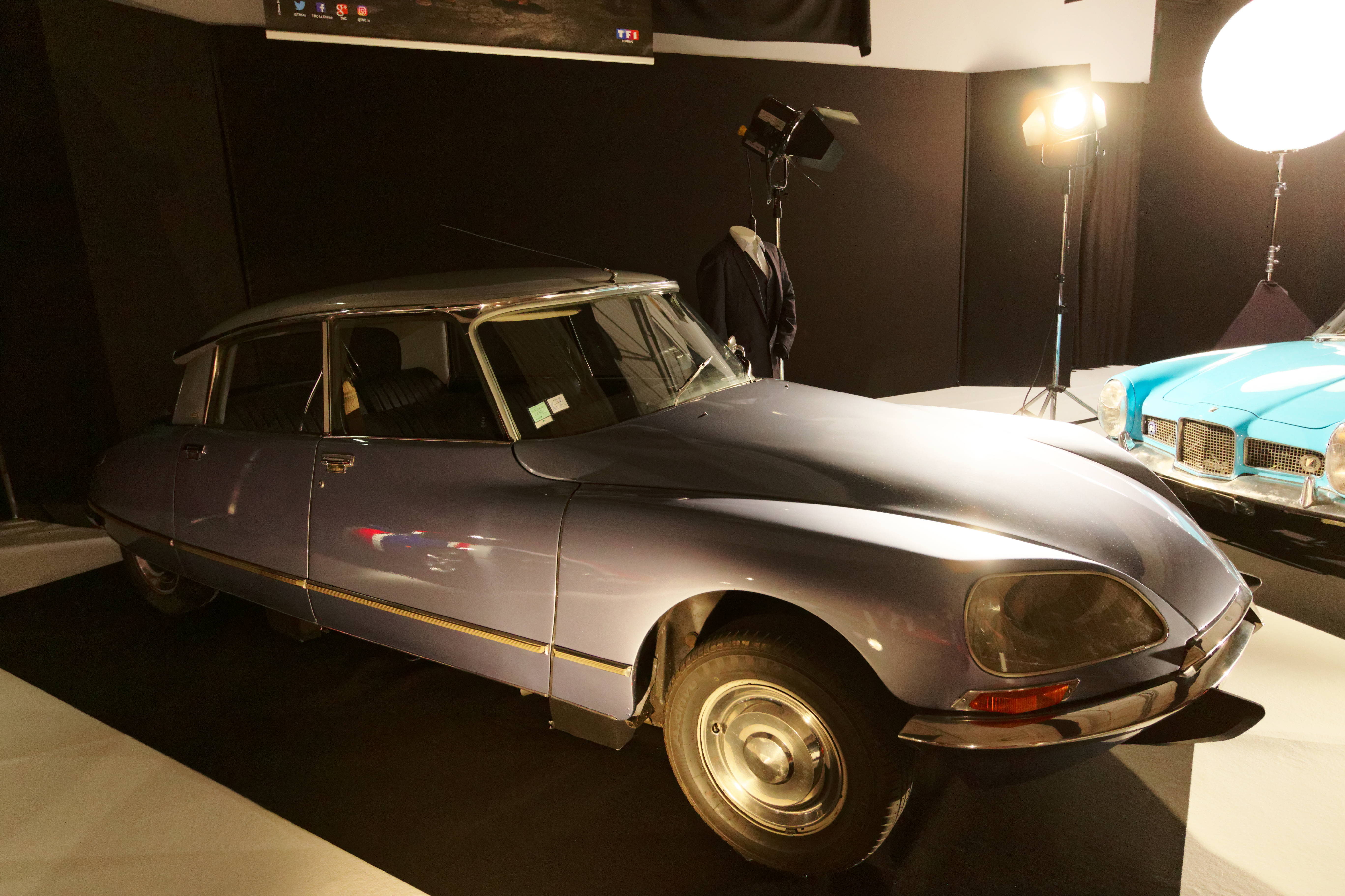 Une Citroën DS 20 Pallas de 1973 présentée lors du mondial de l'automobile de Paris 2016. Cette voiture a été utilisée par Simon Baker pour la série Mentalist, l'acteur a ensuite offert ce véhicule à TF1.